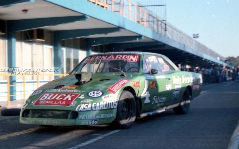 juan de benedictis en la calle de boxes del autodromo de buenos aires con el #4 en su dodge